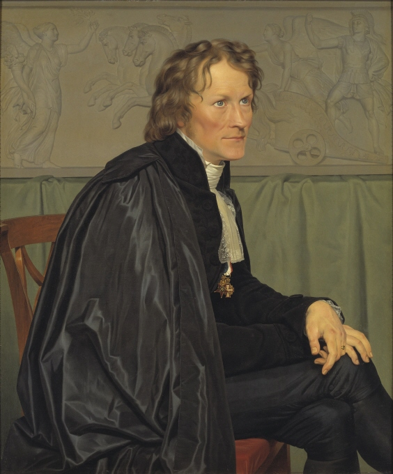 Portræt af Bertel Thorvaldsen (1832)